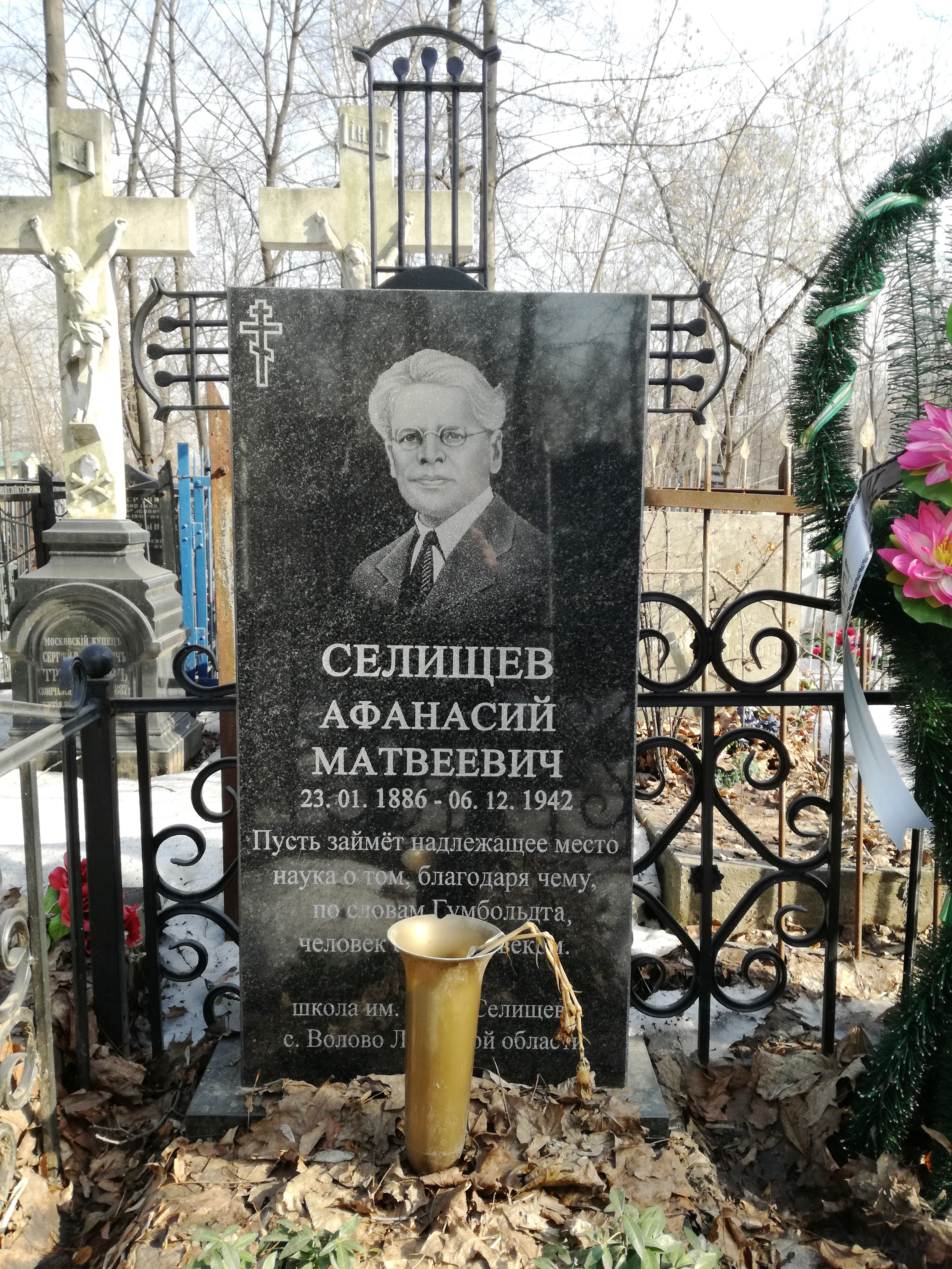 Даниловское кладбище